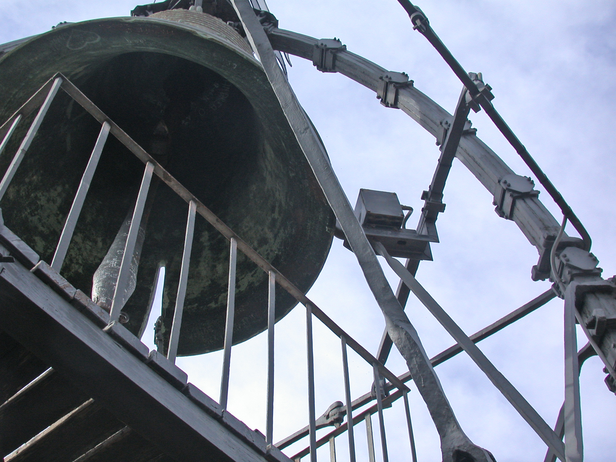 Italia, Siena, Torre del Mangia, campana sulla sommità